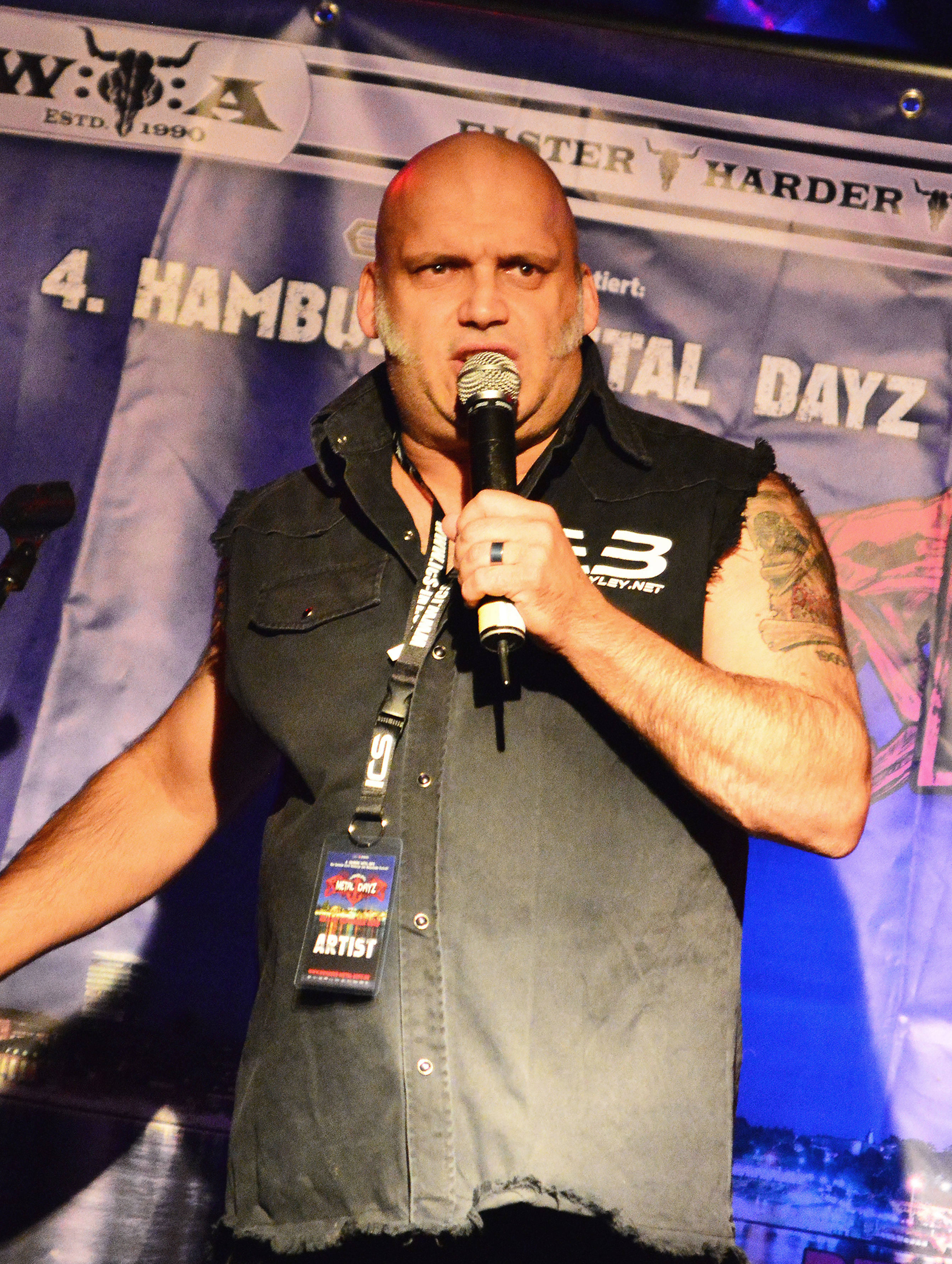 Blaze Bayley bei den Hamburg Metal Dayz 2015